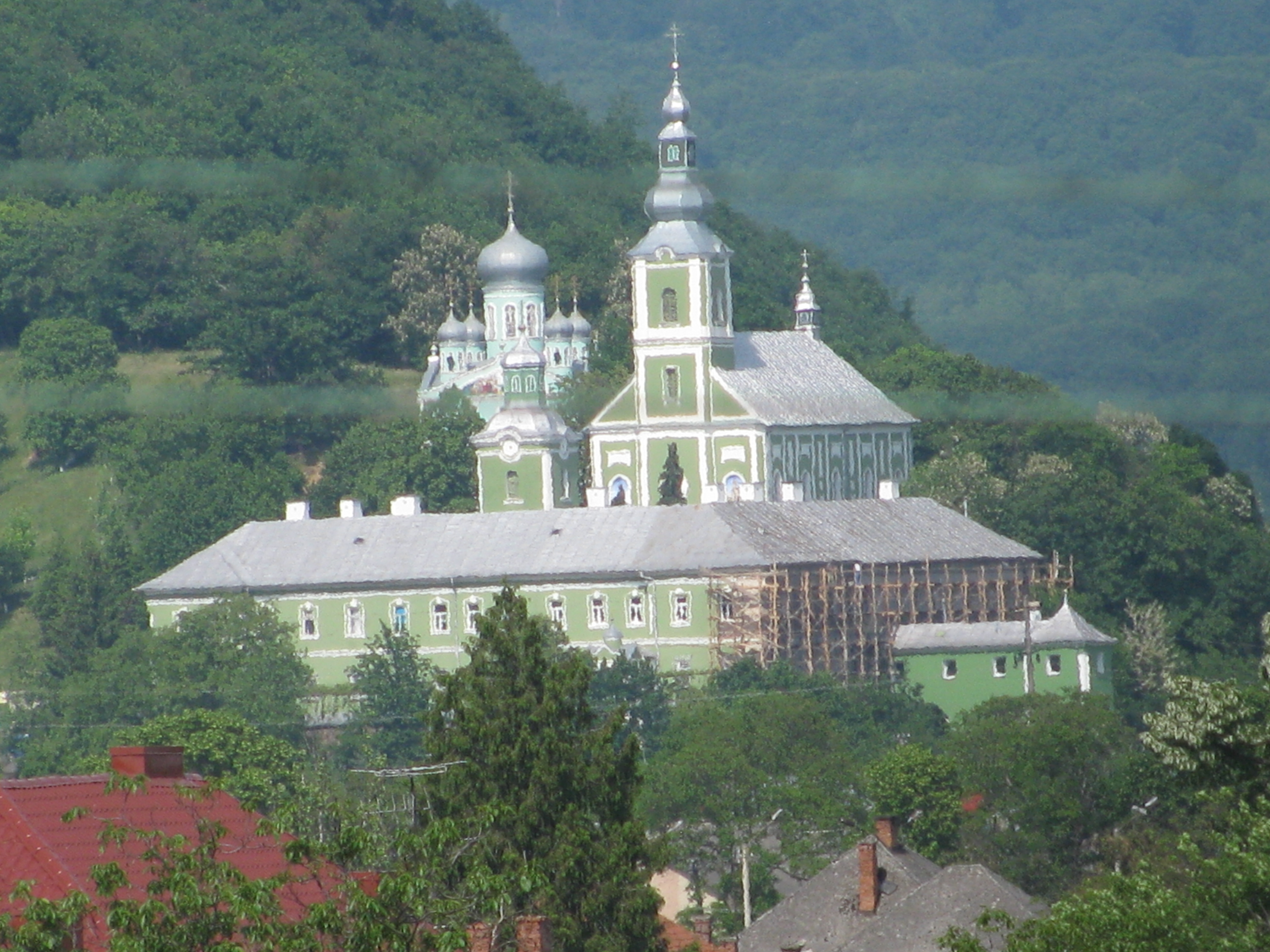 Вид монастиря з міської Ратуші